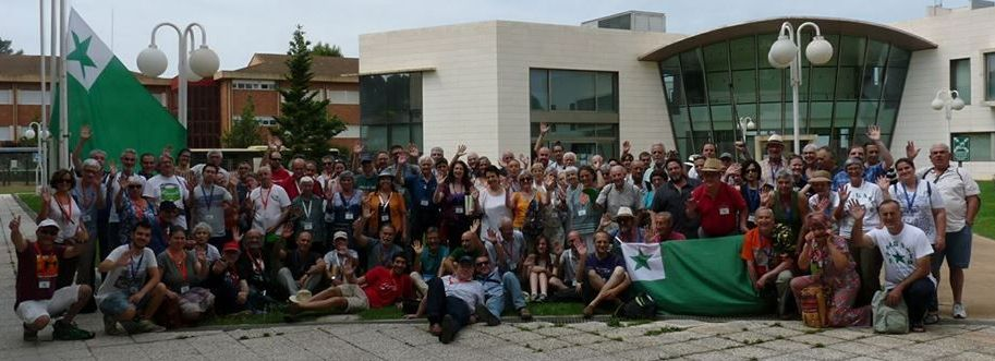 Esperanto kongreso en Teruelo